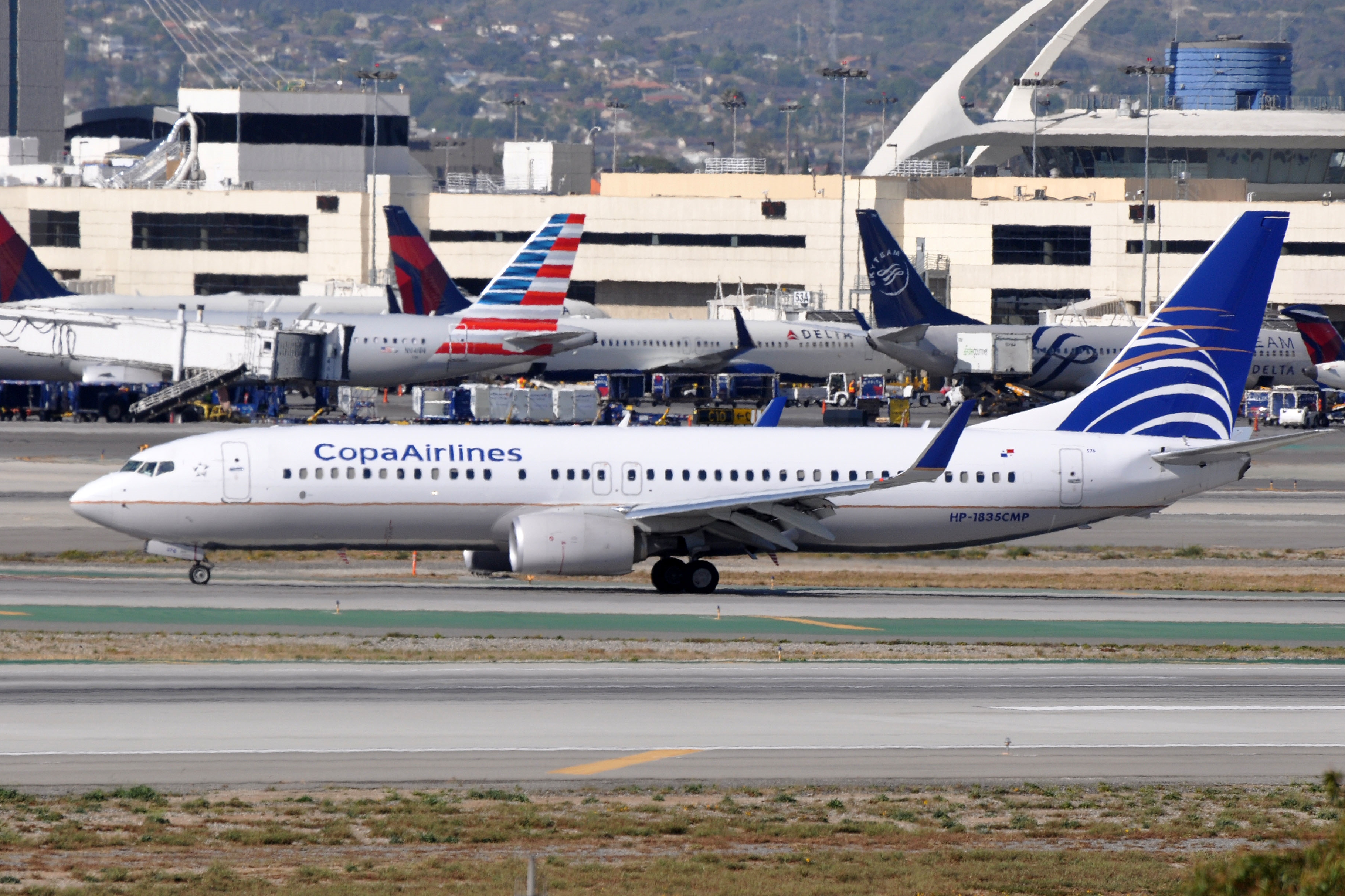 MSN 40790 LN 4626 B737-8V3 COPA AIRLINES LAX AIRPORT